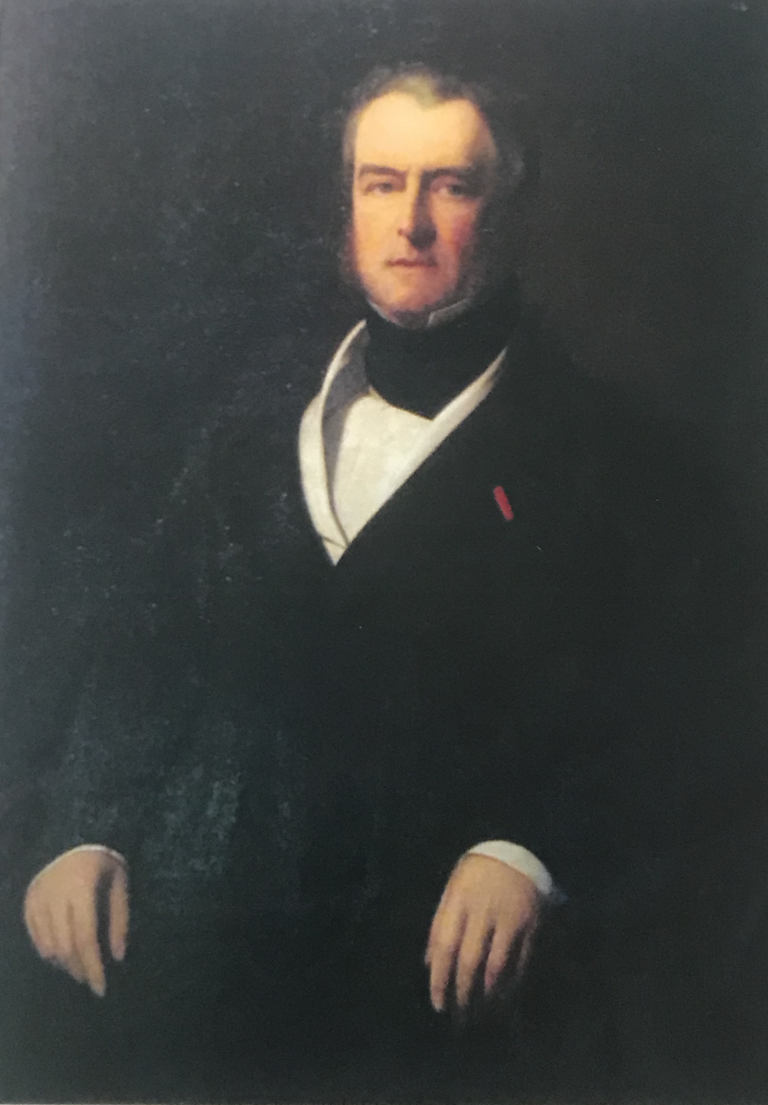 M. Goüin